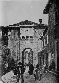 La Porta che dà nome al Quartiere si trovava sul lato orientale dell'attuale piazza di Porta Crucifera, e venne abbattuta nel 1890 per creare una più larga barriera, essendo il varco esistente "basso e stretto"